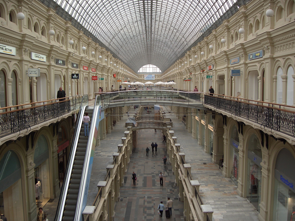 Moscow GUM